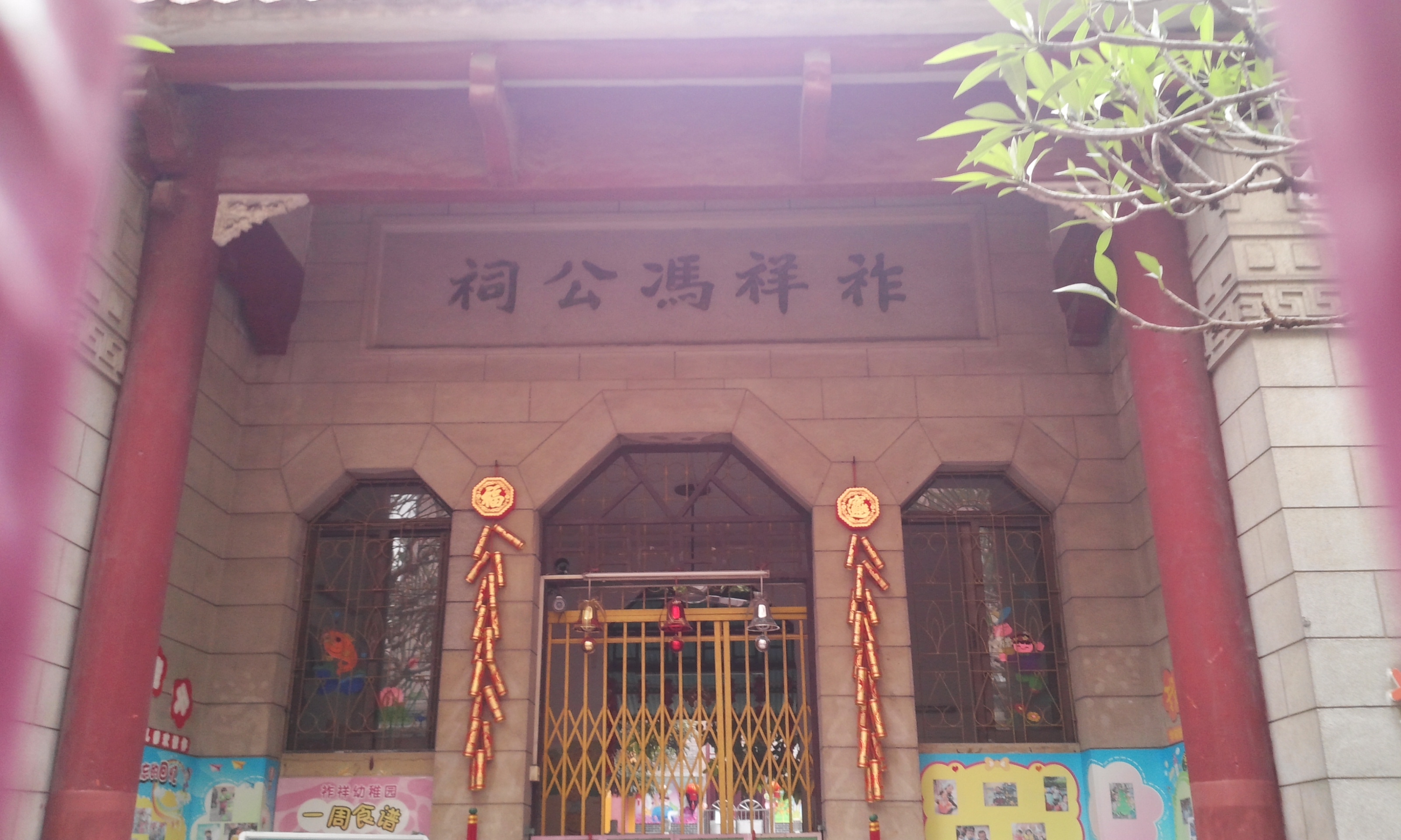 馮公祚祥祠，現今改建為幼稚園